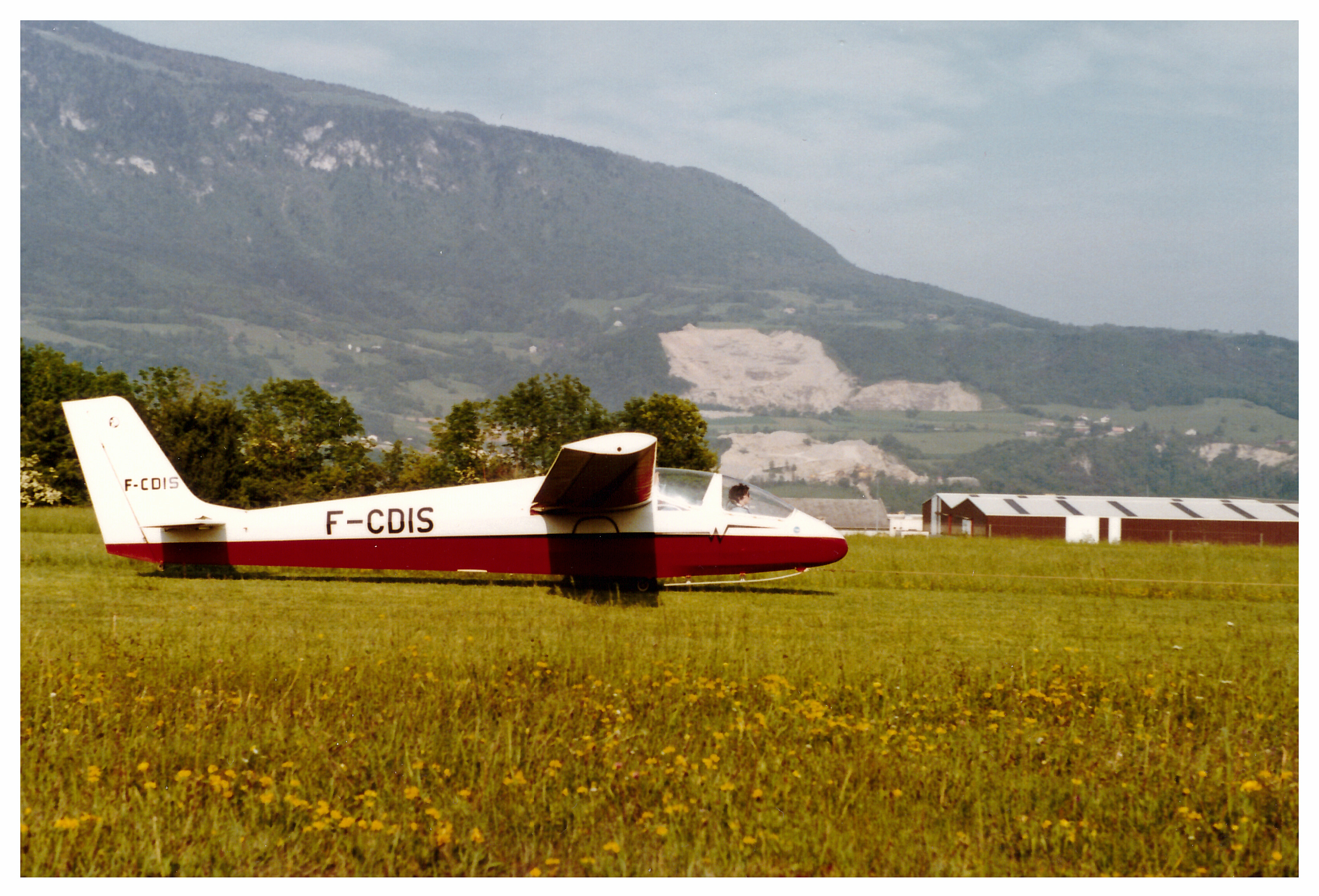 Wassmer WA-30 Bijave sur le terrain de Bellegarde sur valserine